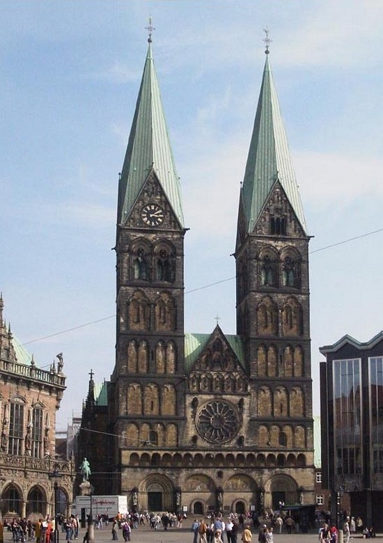 Bremen, St.-Petri-Dom